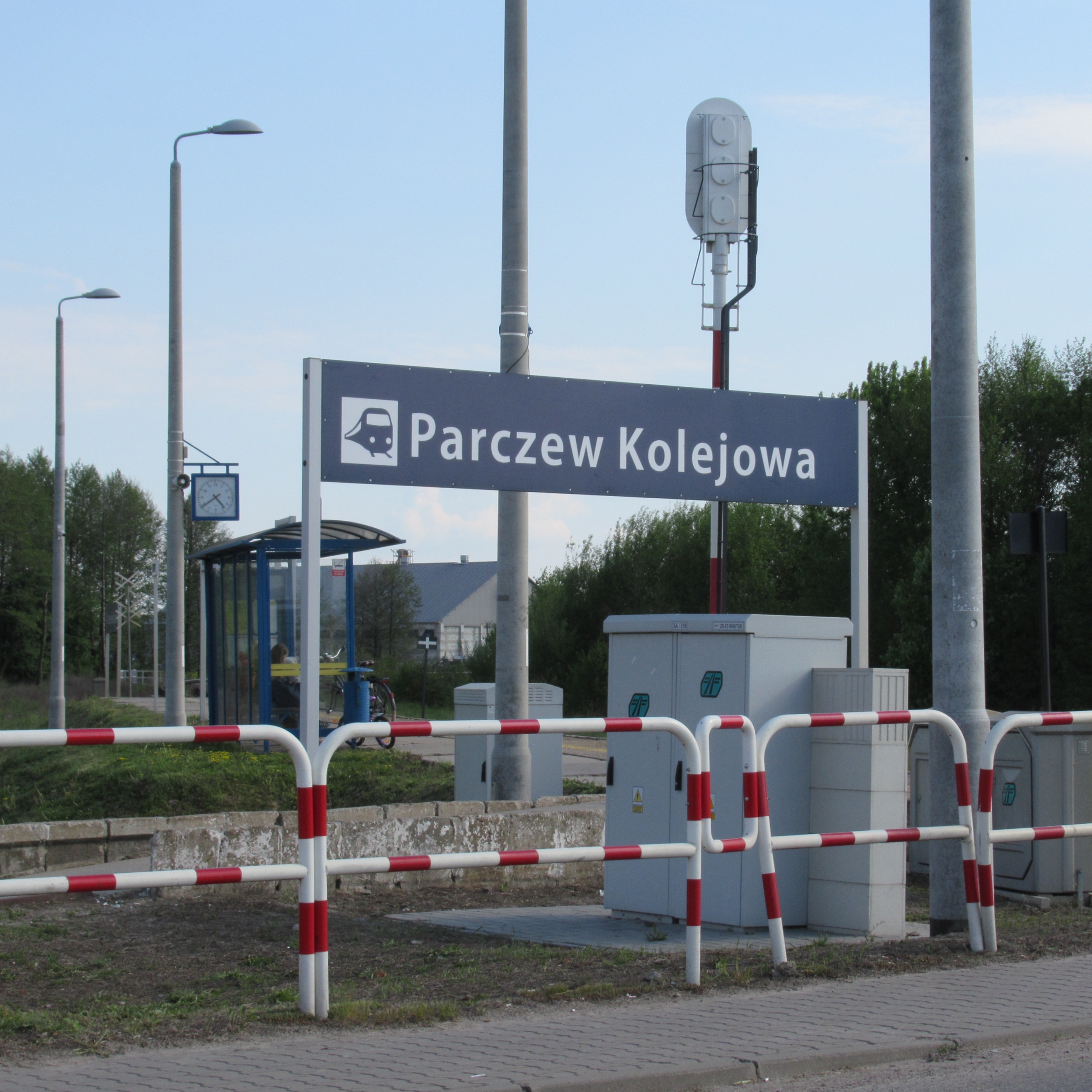 Parczew. Stacja „Parczew Kolejowa”. Tablica od strony ulicy.